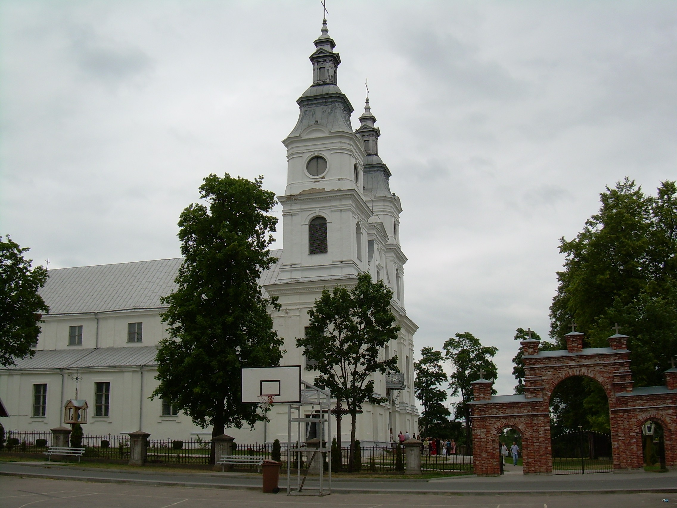 Žemaičių Kalvarijos Švč. Mergelės Marijos Apsilankymo mažoji bazilika